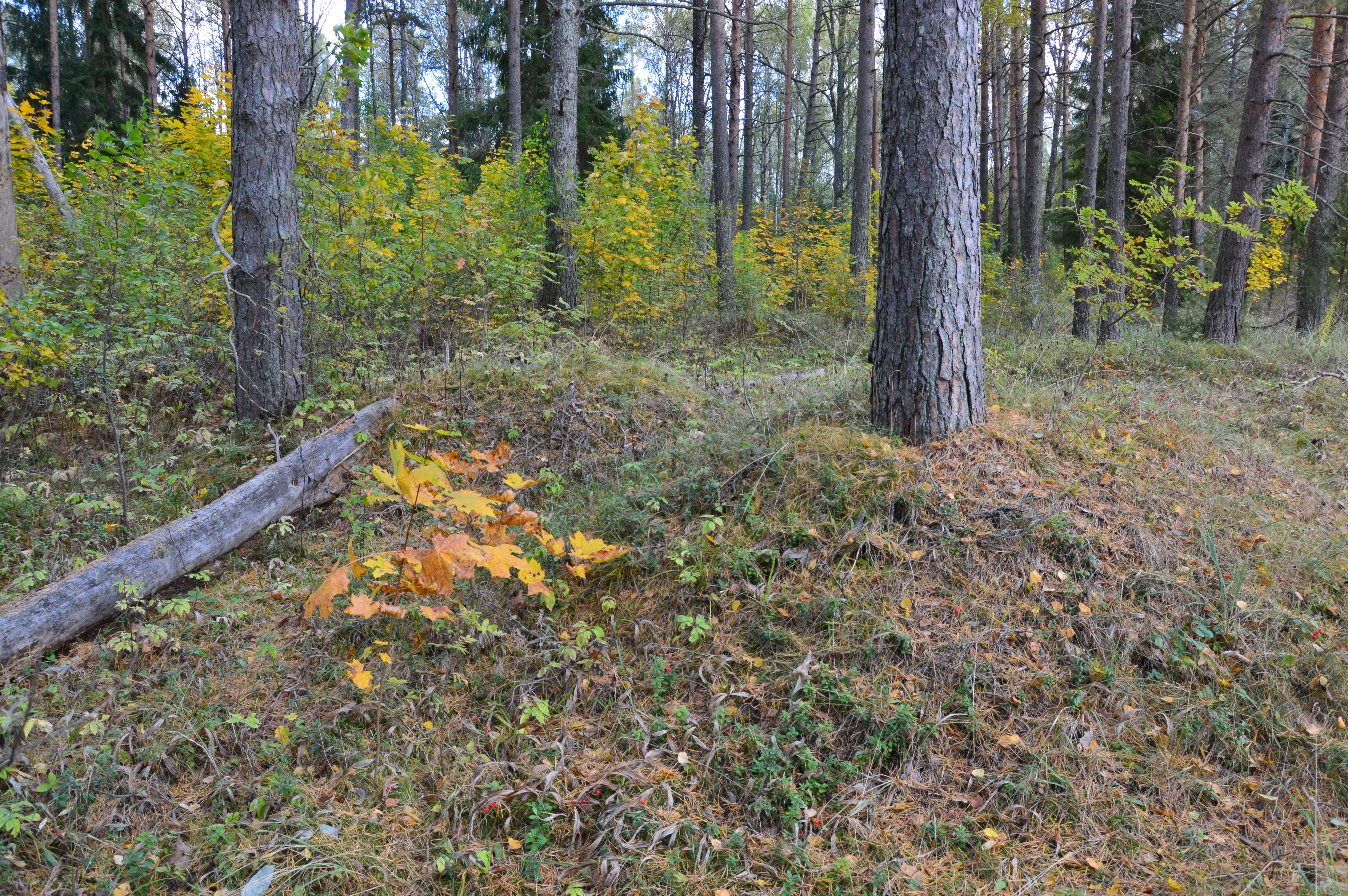 Mõned kääpad Jõuga kääbaskalmistul.